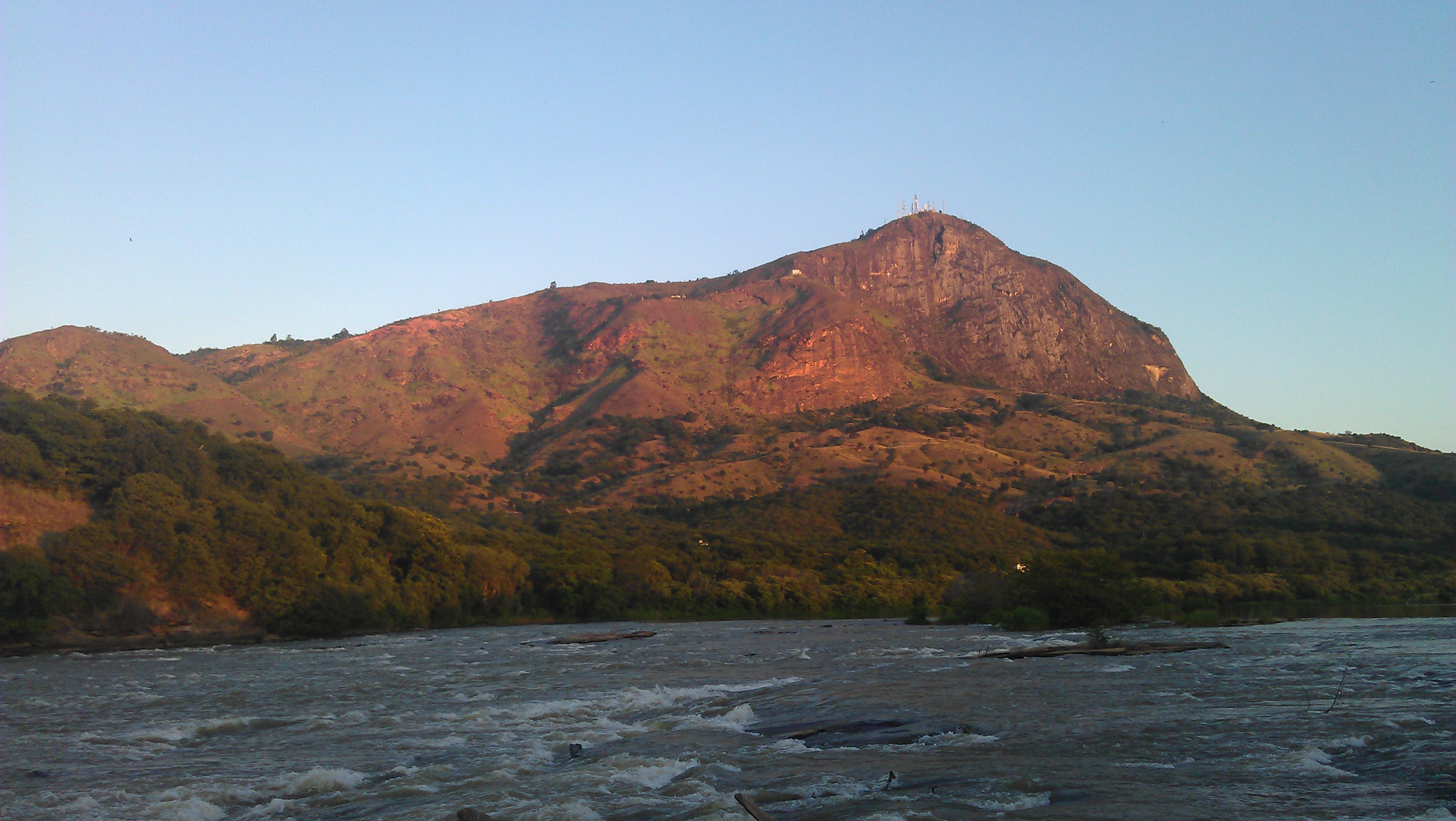 Ibituruna ao por do sol